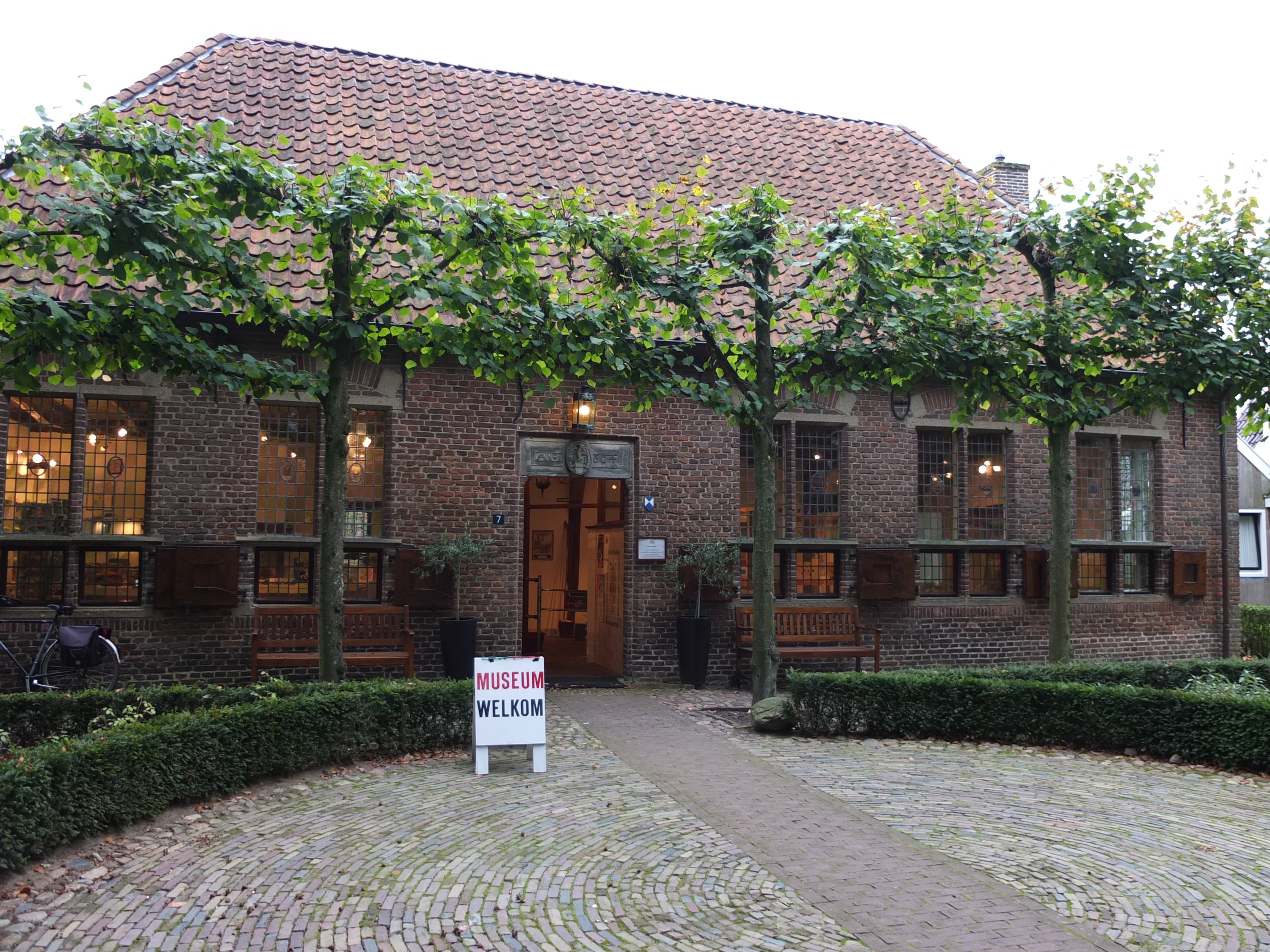 Zicht op een deel van het OERmuseum en het Archeologisch Centrum West-Drenthe in Diever